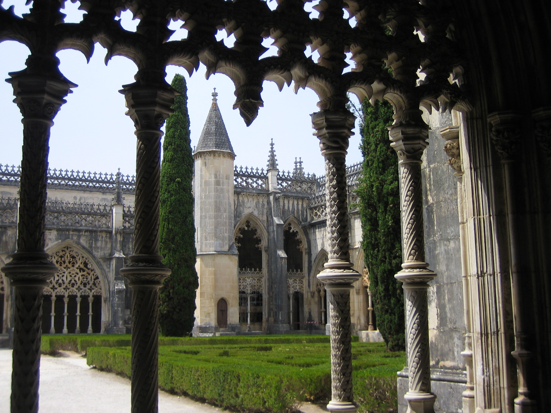 Mosteiro da Batalha (Cloister) - Portugal Author: Raph Date: 6 August 2005